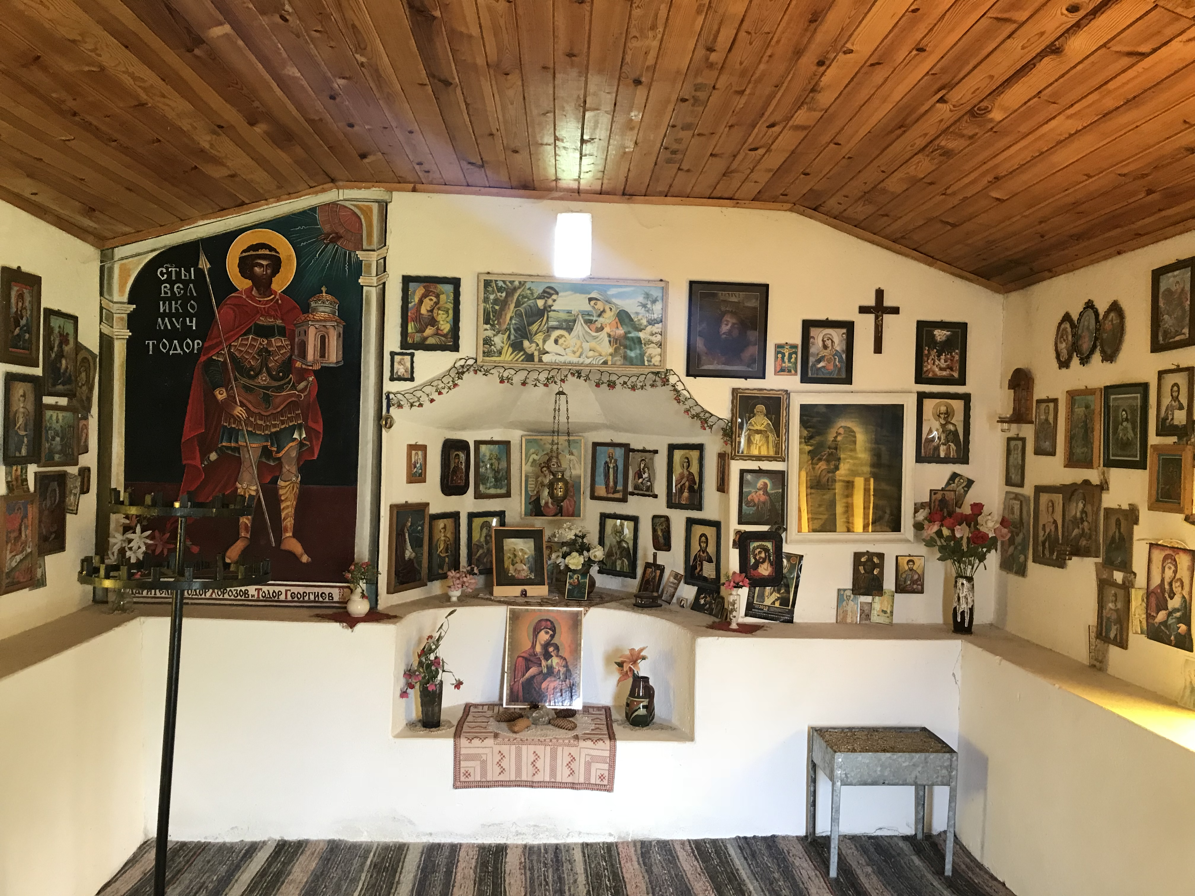 Иконостас “Св. Тодор”, с. Бойково